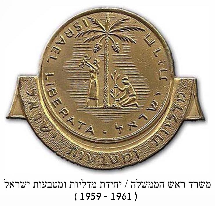 משרד ראש הממשלה - לוגו יחידת מדליות ומטבעות ישראל